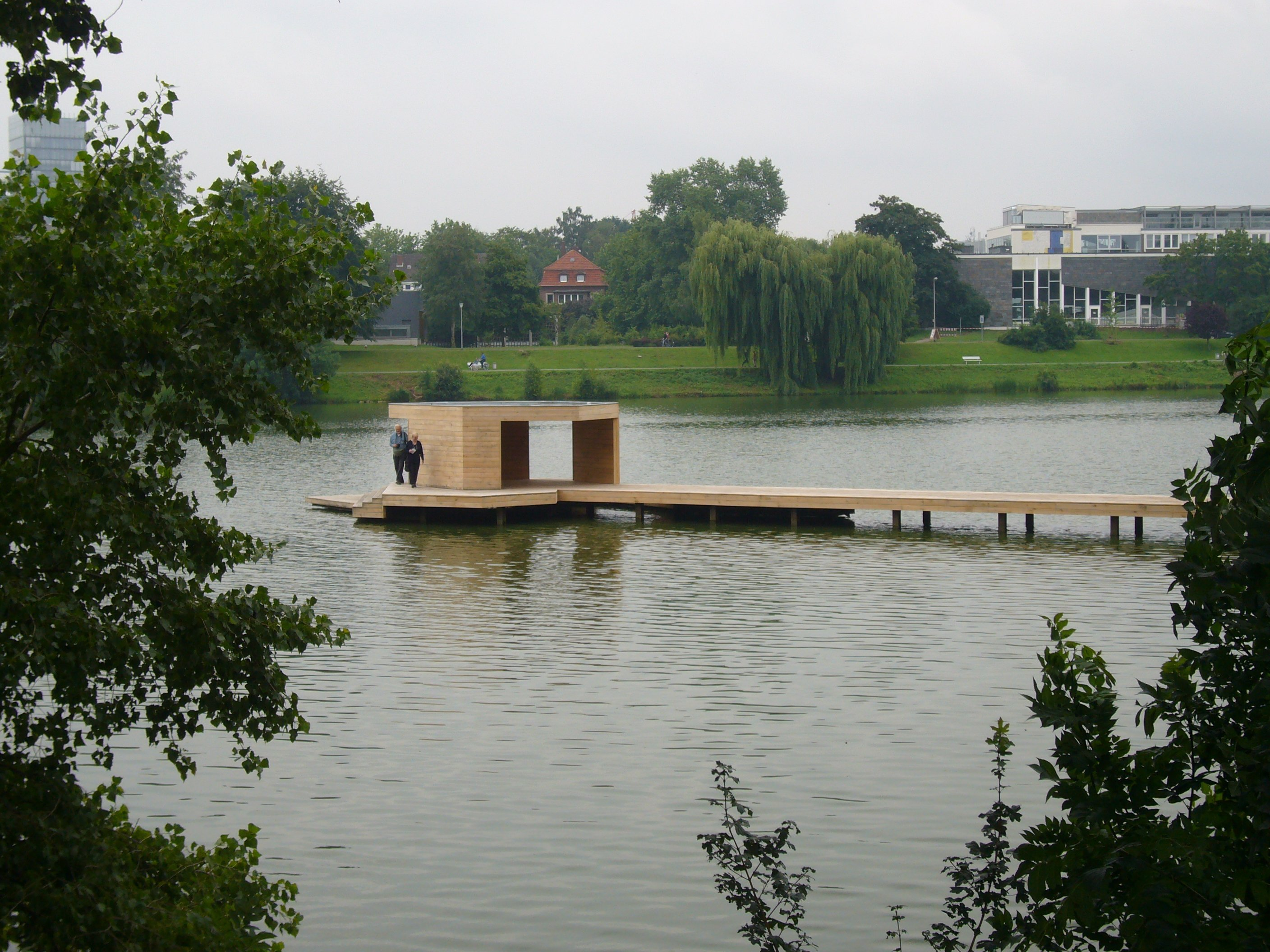 Sculpture "Pier" by Jorge Pardo. Skulptur.Projekte 1997. Location: Aasee, Münster, Germany